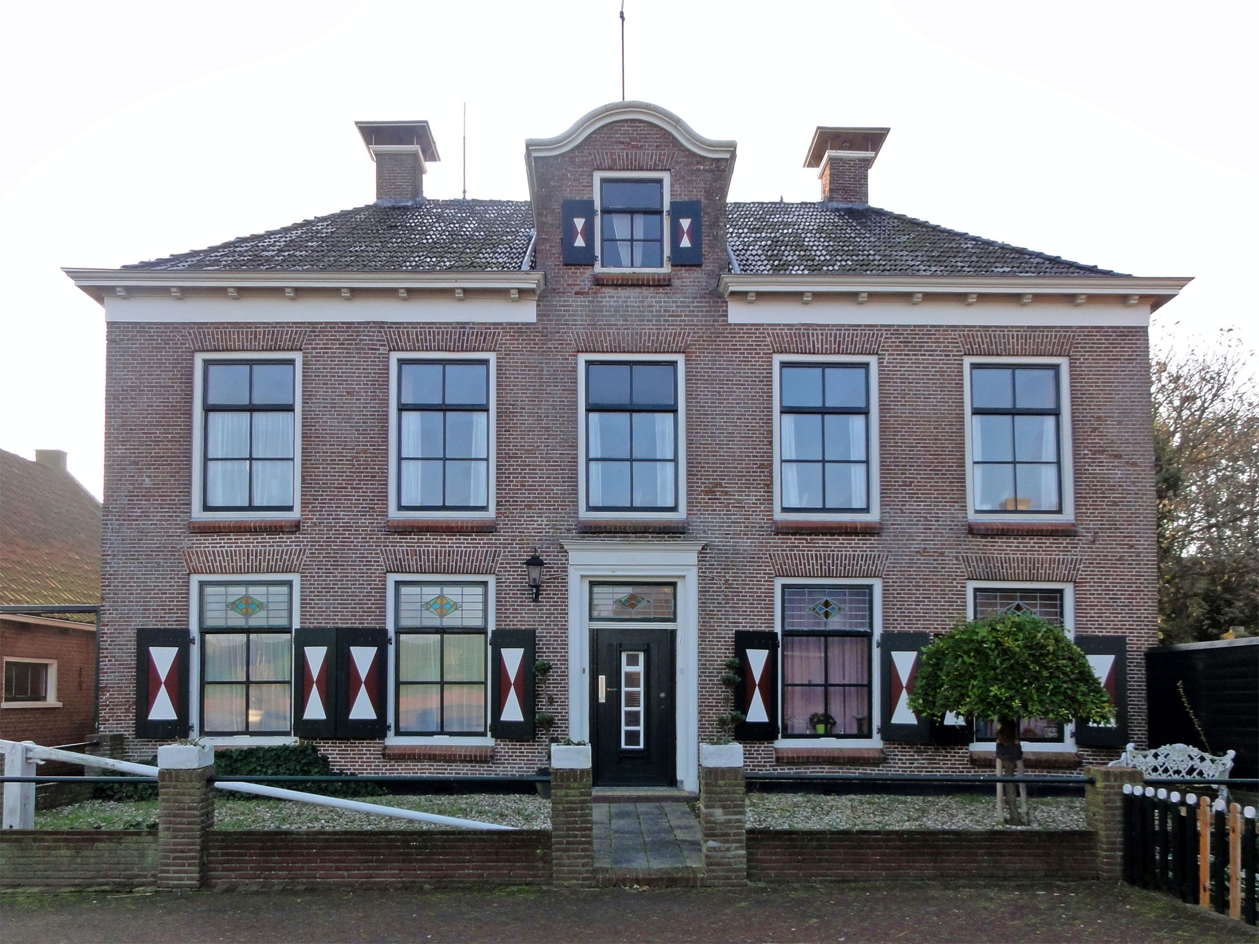 Woonhuis aan het Tsjerkeplein 2 in Wierum